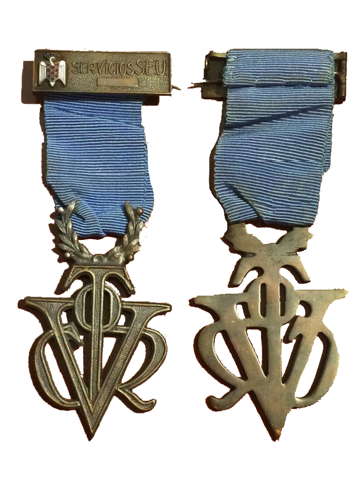 Victor de bronce del S.E.U